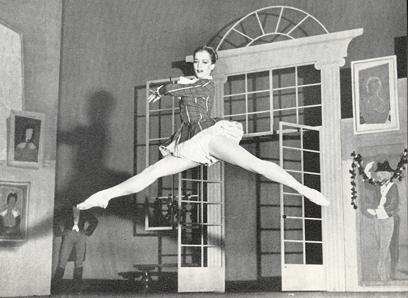 Marianne Fröijdh